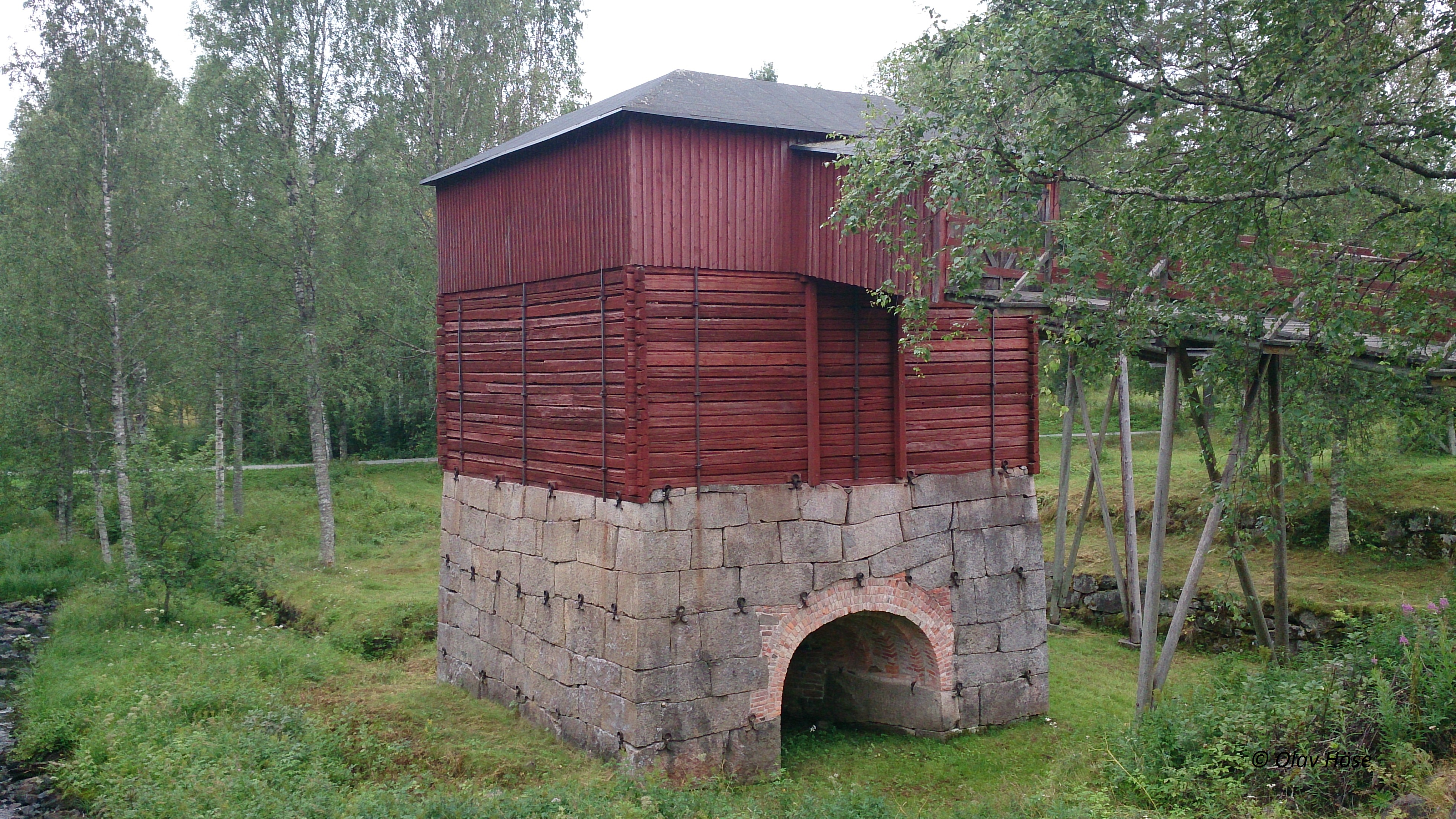 Rosfors bruk i augusti 2013.